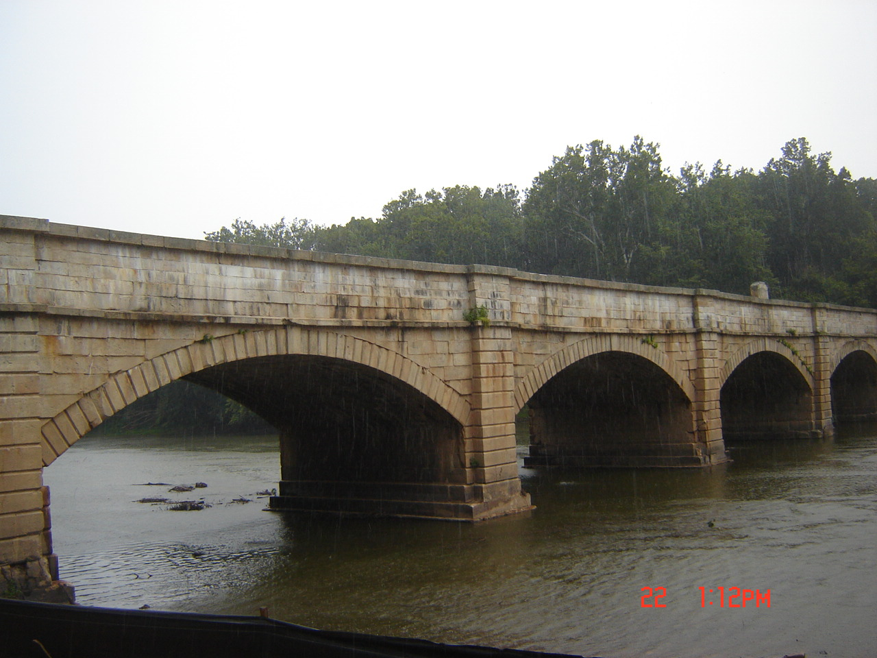 MonococyAqueduct